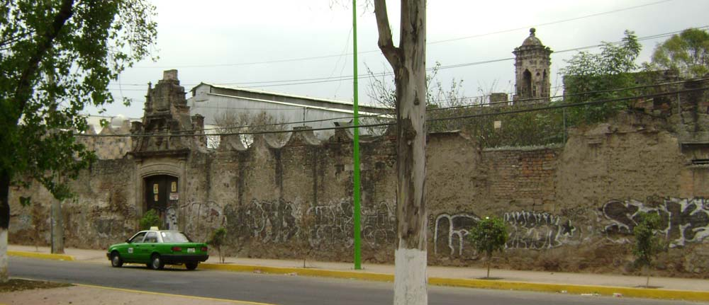 Muro frontal del Pensil Mexicano, donde son visibles la erosión y el vandalismo